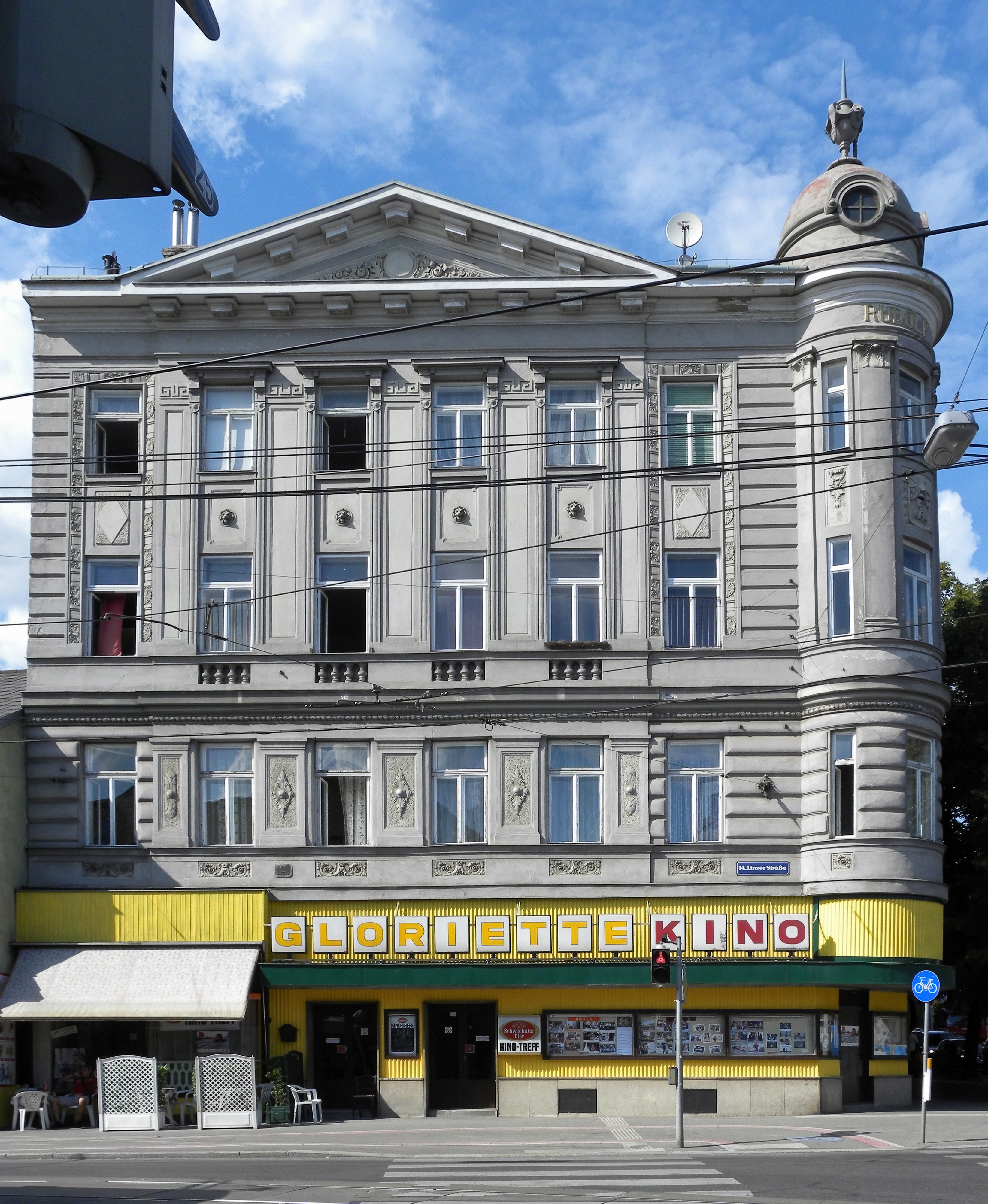 Das Gloriette-Kino in der Linzer Straße 2 entstand kurz vor Beginn des 1. Weltkriegs aus einem Gasthaus. Während der letzten Jahrzehnte war es vor allem für sein Kinder- und Jugendprogramm bekannt. (Es soll noch im Februar 2012 geschlossen werden.)